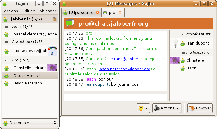 Copie d'écran de Gajim